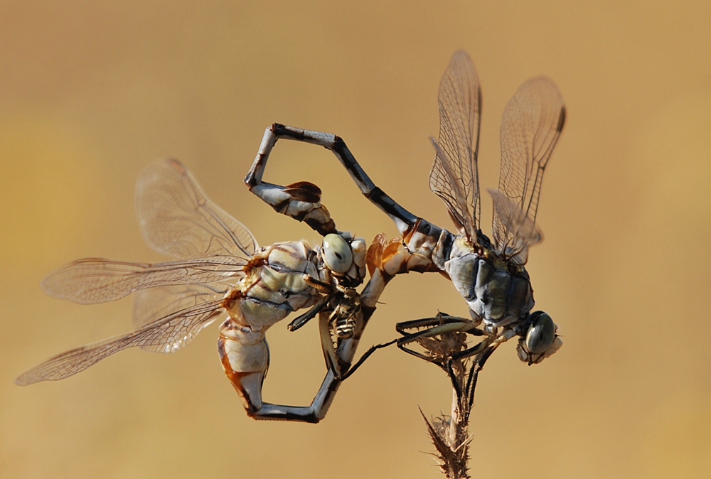 Kurdî: Li Bismillê hatiye kişandin. Navê Latînkî: Lindenia tetraphylla/navê kurmancî yê sîstematîk nehatiye tespît kirin.